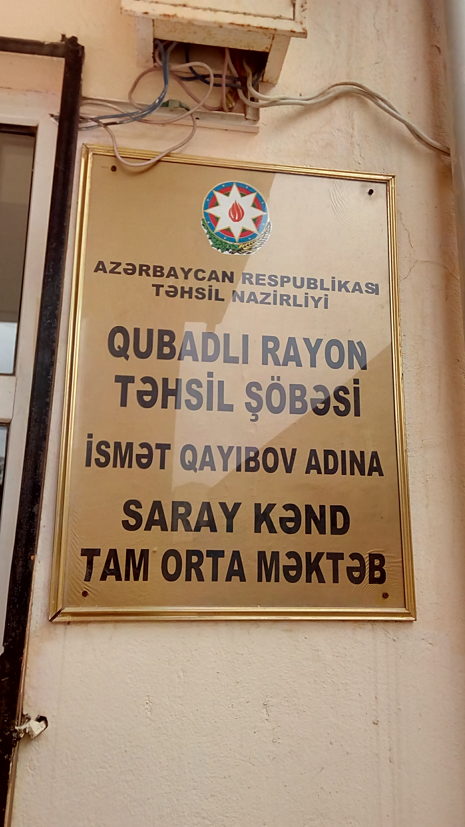 Sumqayıtda Qubadlı Saray kənd tam orta məktəbi